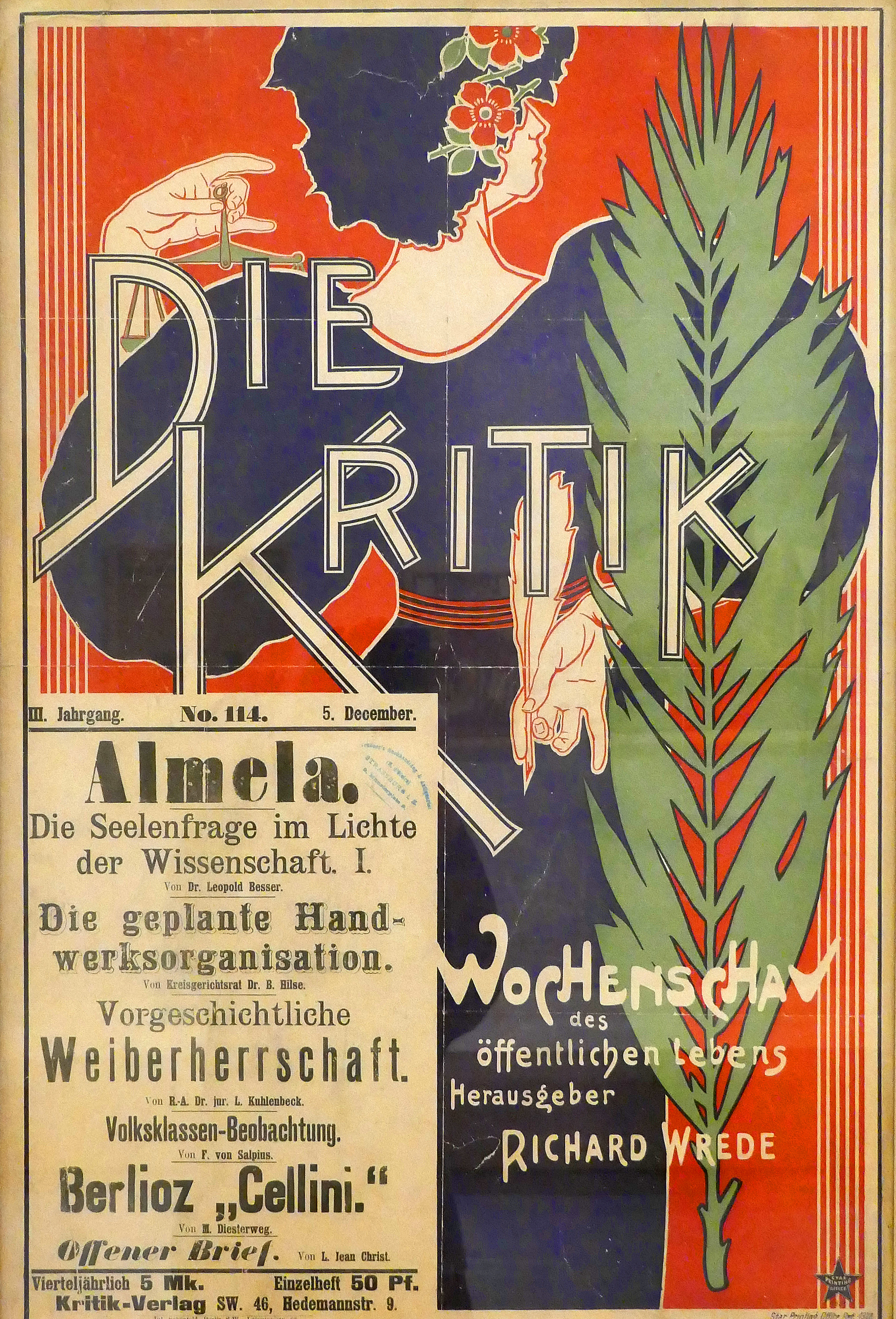 Hans Christiansen. Die Kritik, vers 1896. Affiche évoquant la vie culturelle en annonçant l'hebdomadaire berlinois Die Kritik. Lithographie en couleur. Exposition Laboratoire d'Europe Strasbourg, 1880-1930 au Musée d'art moderne et contemporain de Strasbourg.